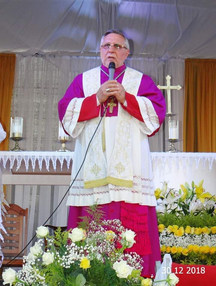 Dom Angelo Pignoli por ocasião da abertura do triênio jubilar da Diocese em Quixadá, 2018